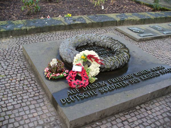 Grabplatte für das Kameradengrab auf dem deutschen Soldatenfriedhof Langemark